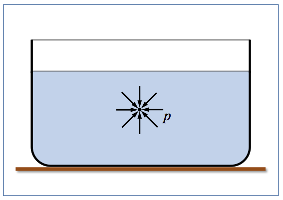 Oreka-egoeran dagoen fluido baten barneko puntu bateko presioa berbera da norabide guztietan.